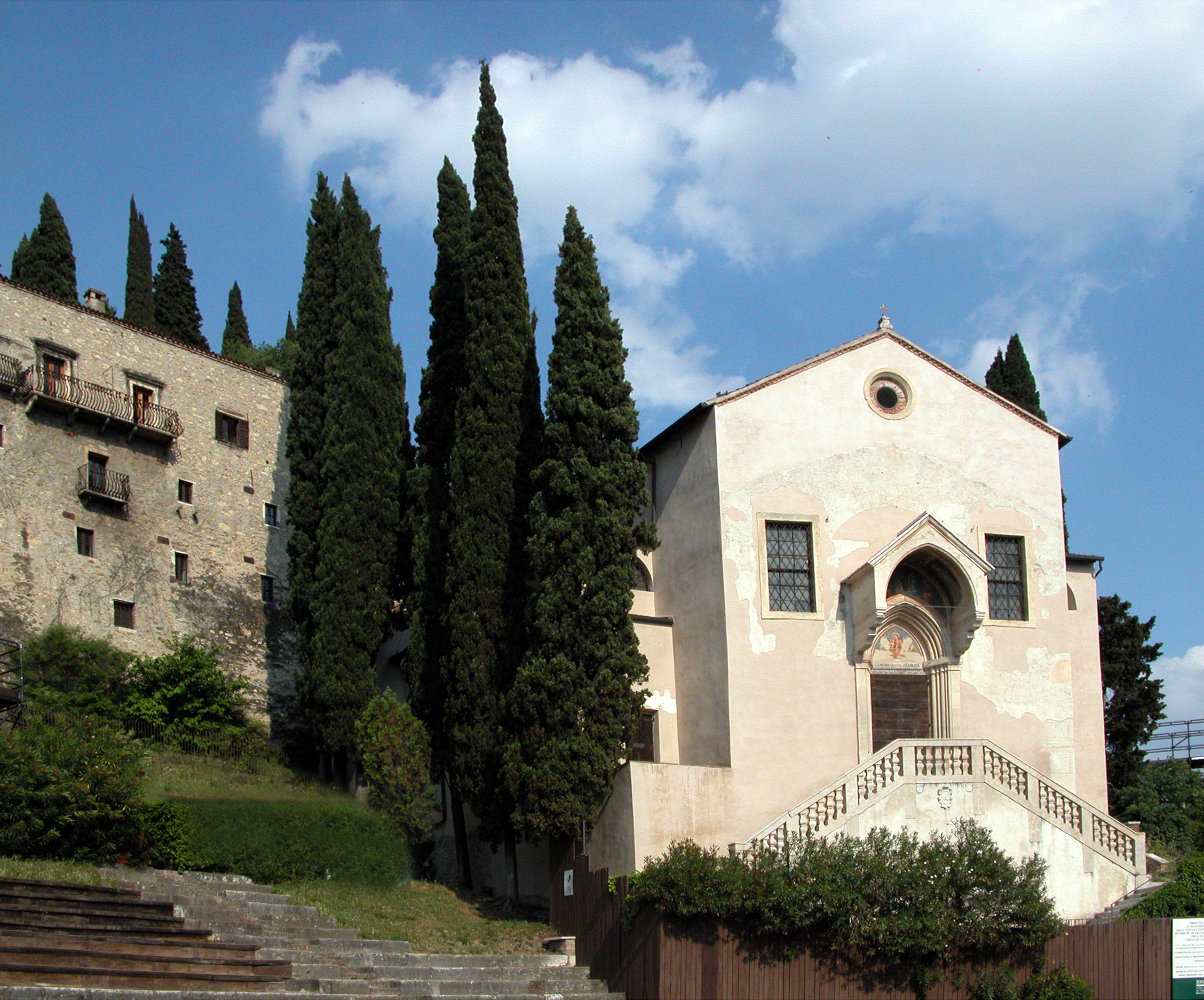 Chiesa di Santa Libera e San Siro - si noti in lato a sinistra l'edificio dell'ex convento dei Gesuati, ora sede del museo archeologico di Verona